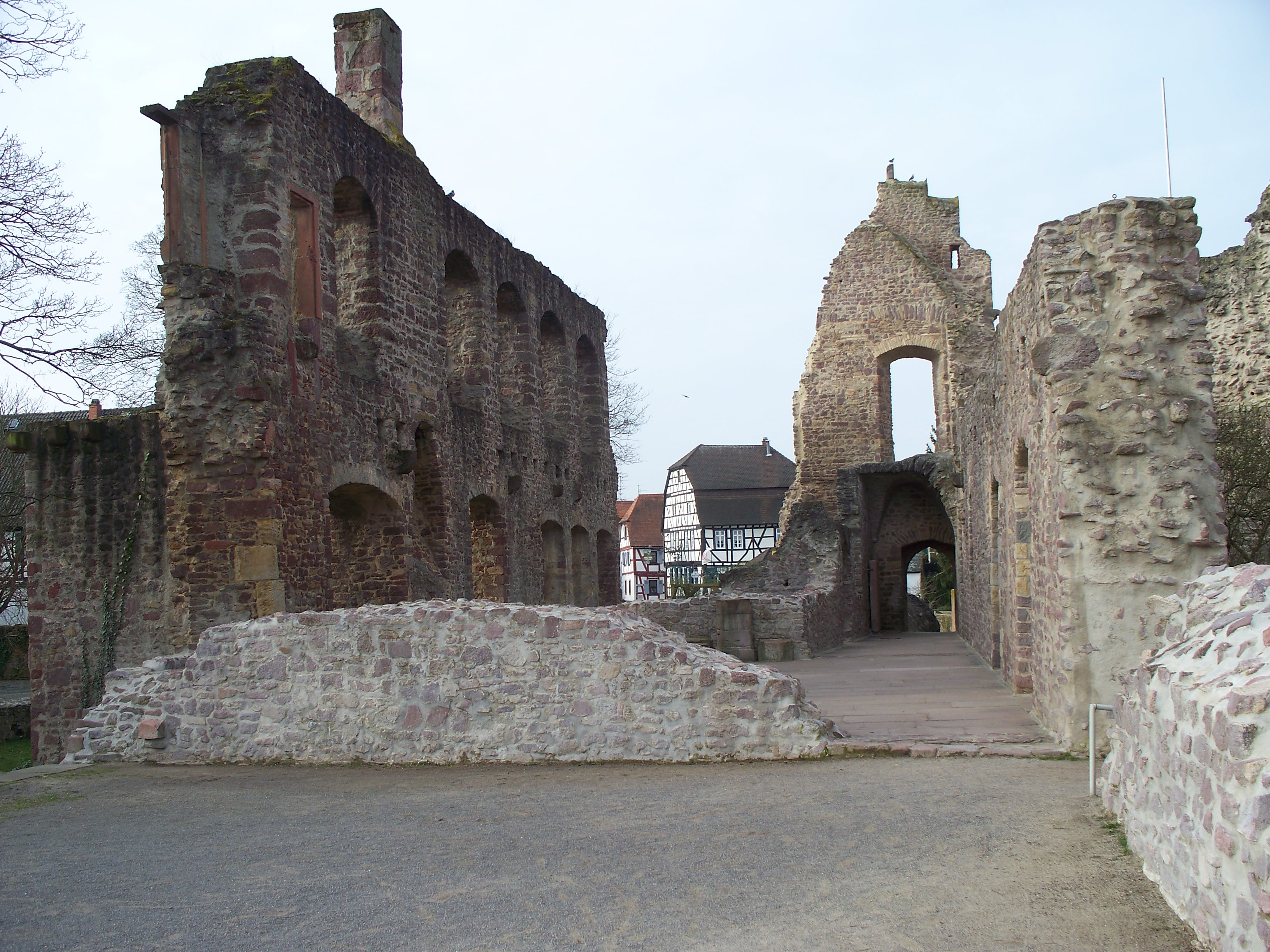 Burg Dreieichenhain, Blick durch die restlichen Mauern des Palas auf die Altstadt